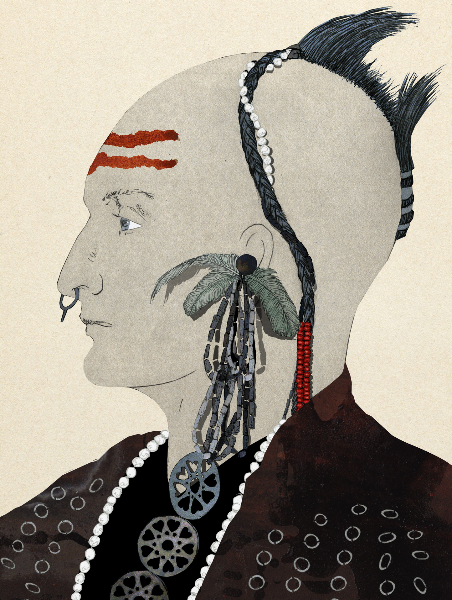 Imatge del jefe indi Chief Pacan, també nomenat Pacanne.